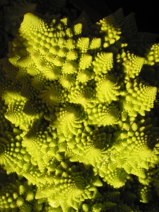 Chou Romanesco, 8 février 2004, Dieppe